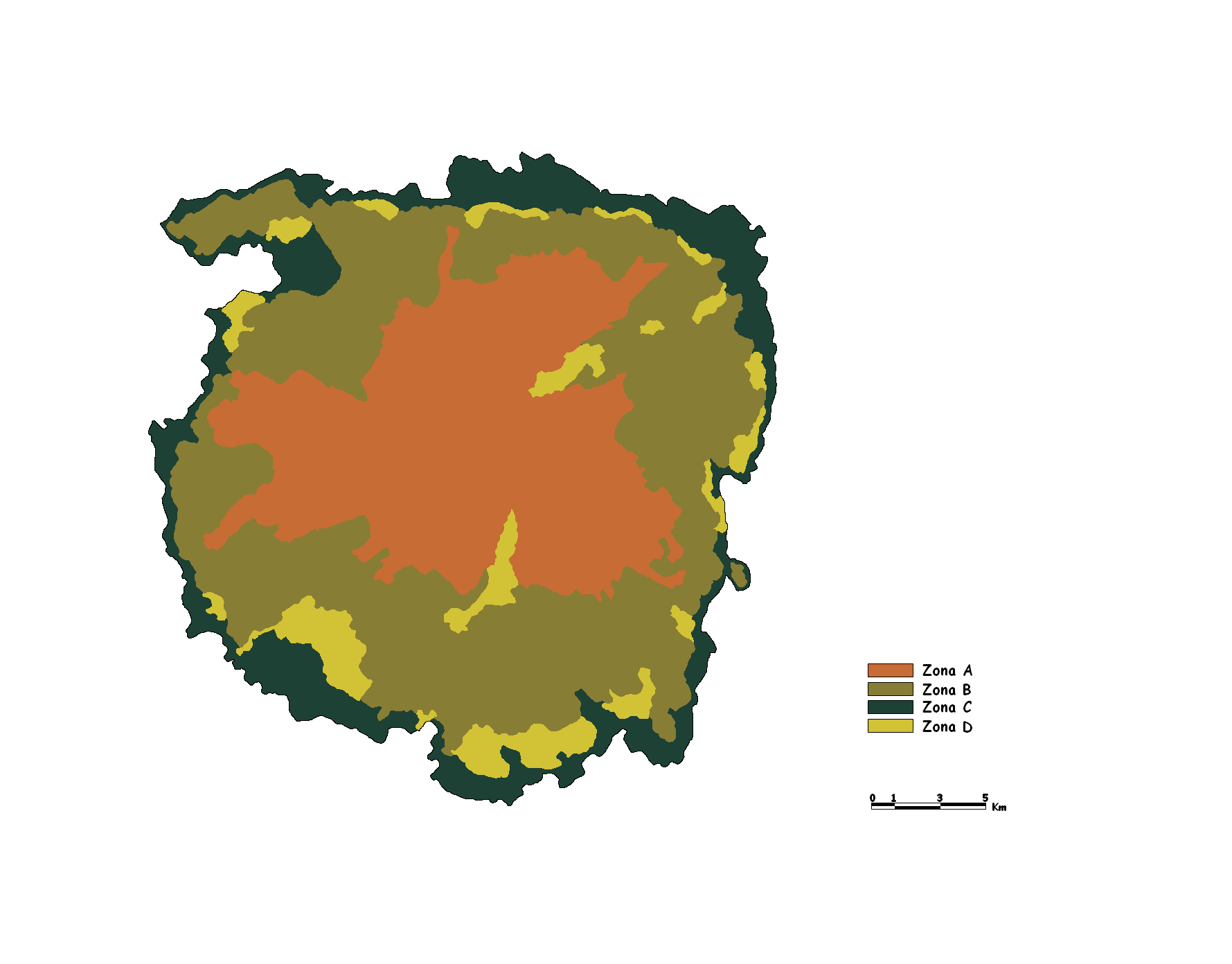 Etna park zoning